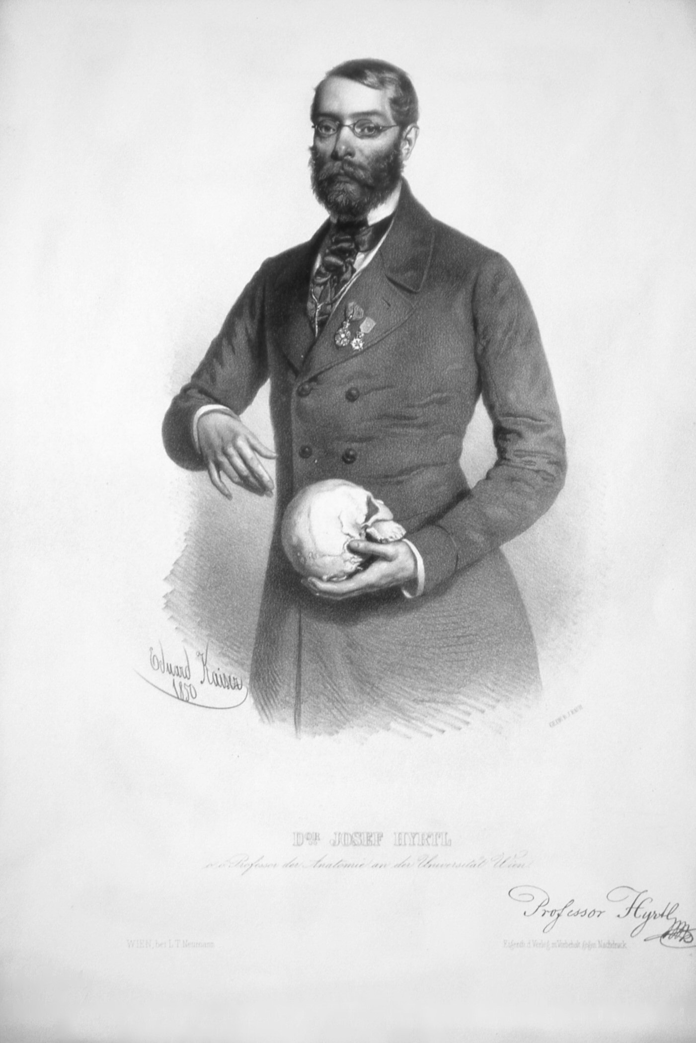 Joseph Hyrtl (1810–1894), Lithographie von Eduard Kaiser (1820–1895) aus dem Jahre 1850